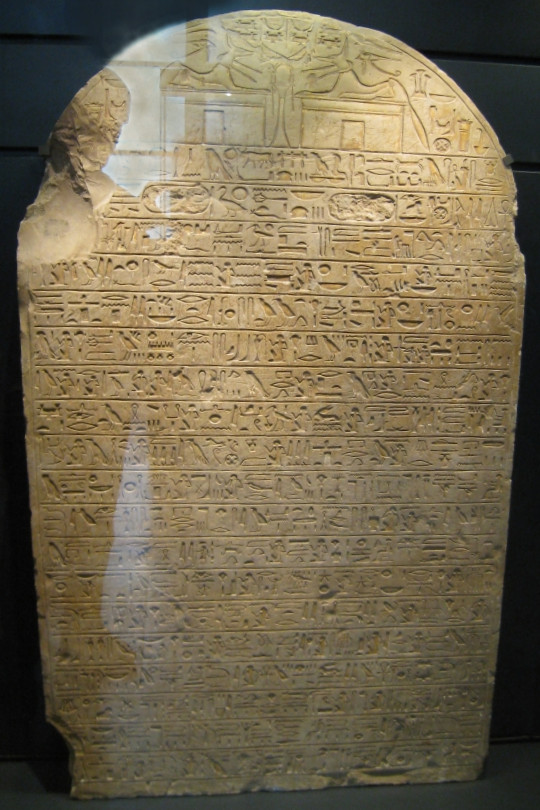 Stèle de Nakhtmin, chef des travaux du roi, règne d'Aÿ - XVIIIe dynastie égyptienne - Musée du Louvre